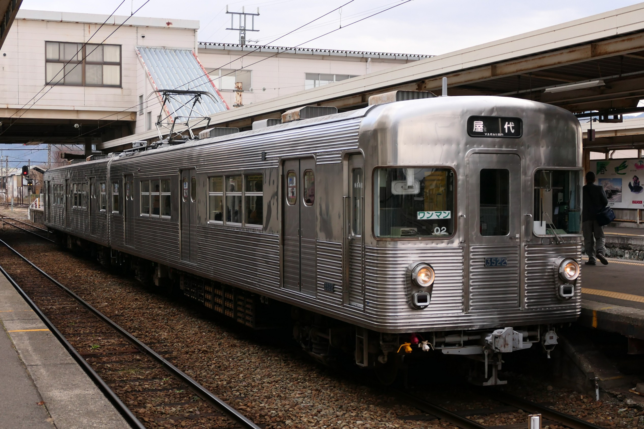 長野電鉄3500系電車O2編成